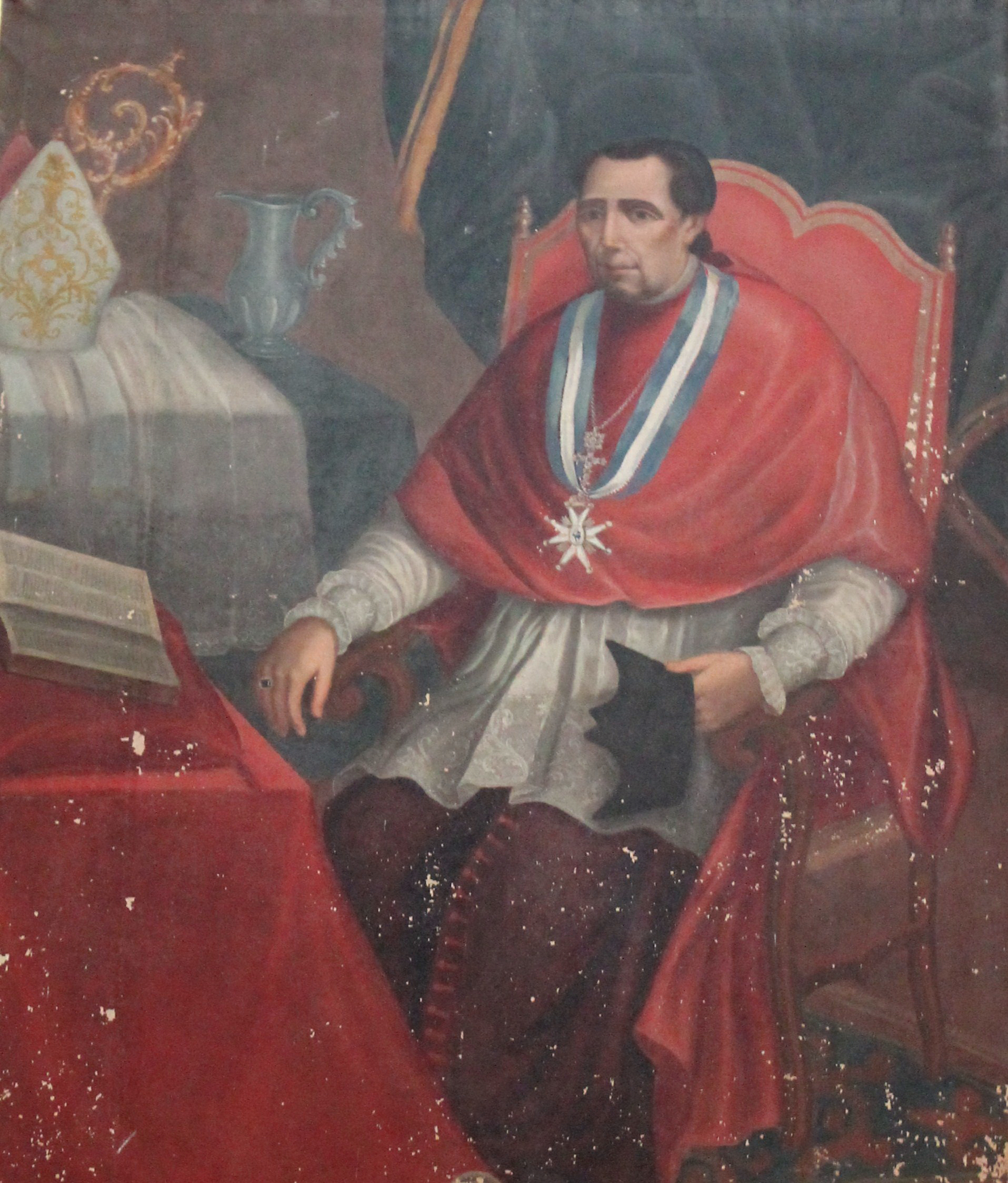 Detalle del retrato del obispo Agustín Rubín de Ceballos situado en la sacristía que mandó construir en la iglesia de Santa María de la Asunción de Dueñas.